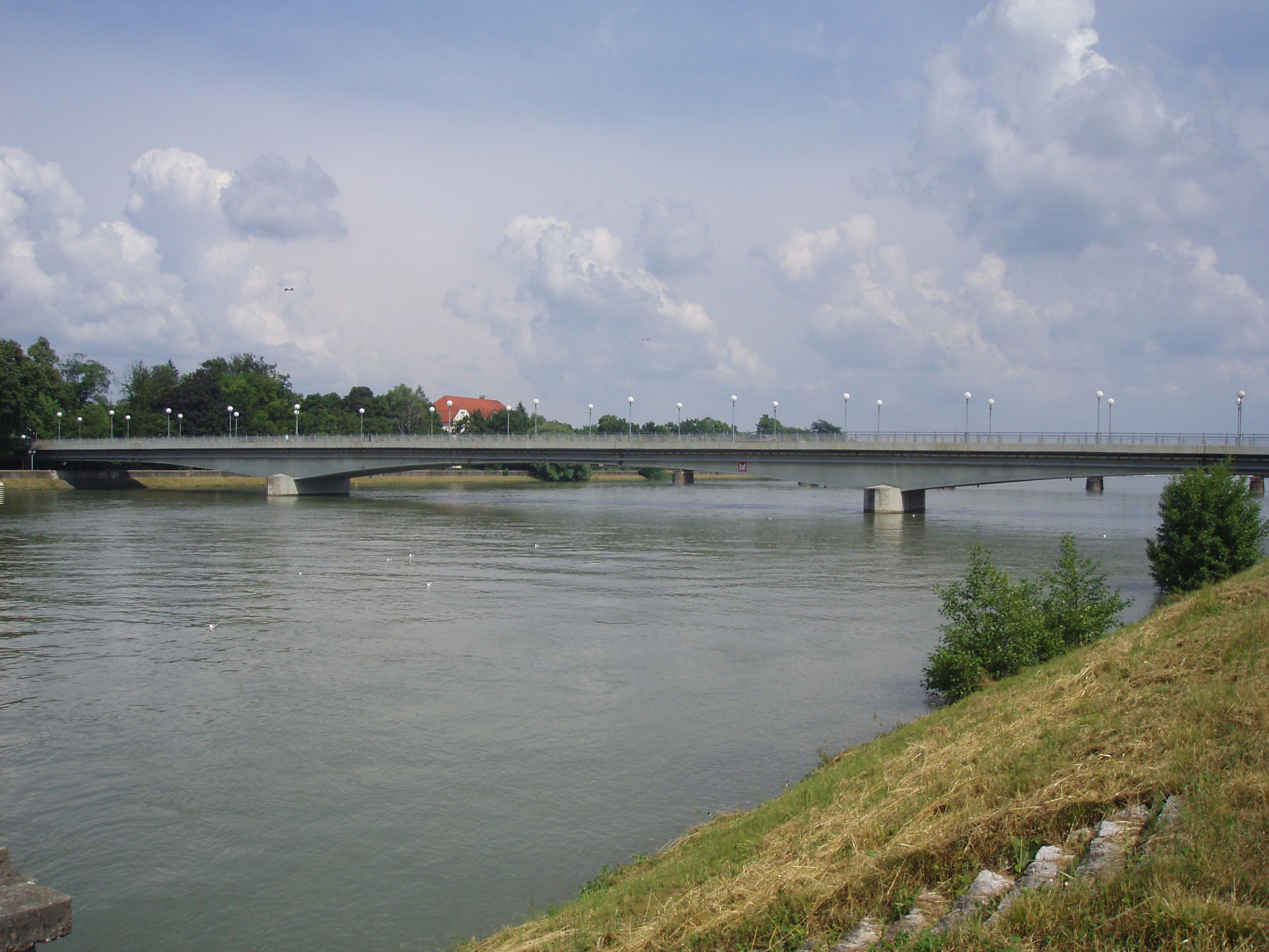 Dráva ve městě Ptuj